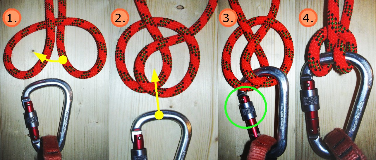 Mastwurf